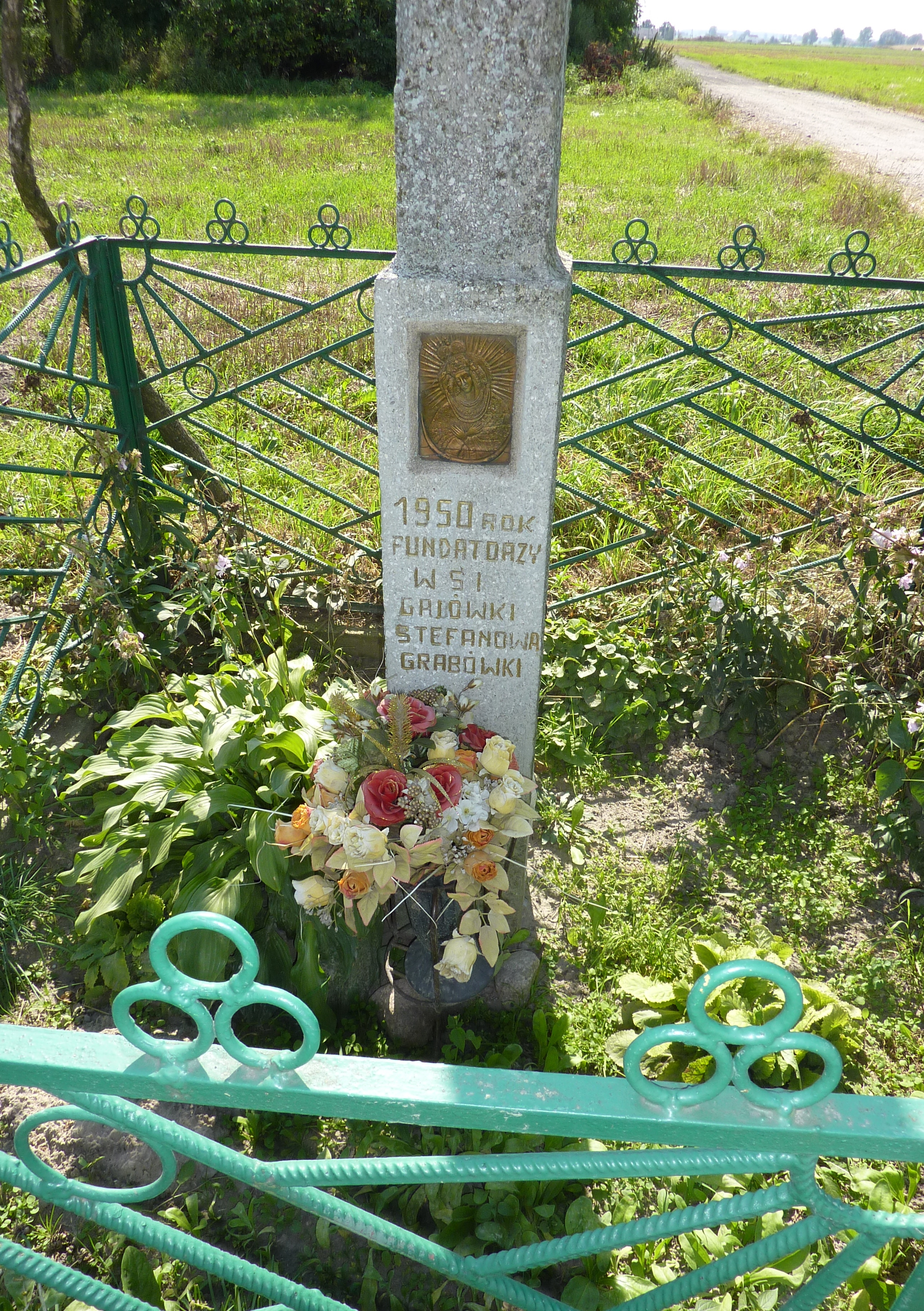 Fragment przydrożnego krzyża na rozdrożu we wsi Stefanowo (sołectwo Grabówka w gminie Choceń, powiat włocławski).